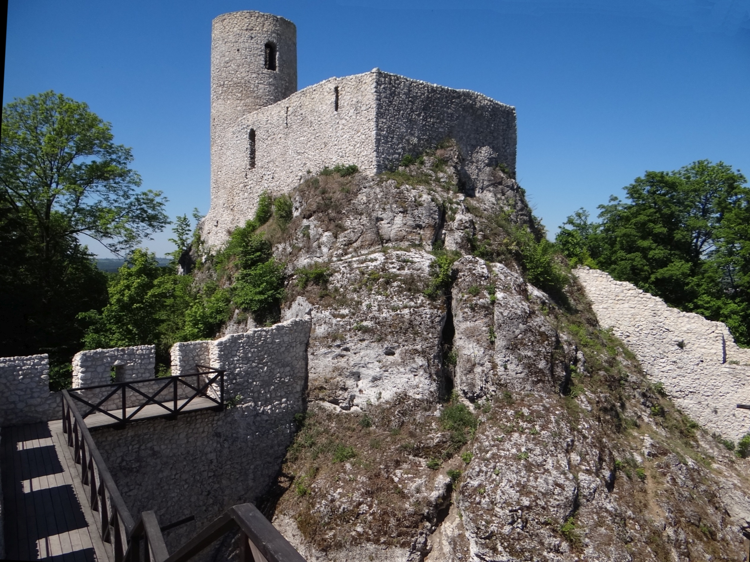 Zamek w Smoleniu (Zamek Pilicz)